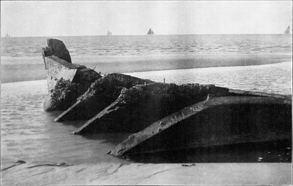 Am Scharhörnriff bei Ebbe. Wrack einer Bark, kieloben liegend, mit Muscheln bewachsen